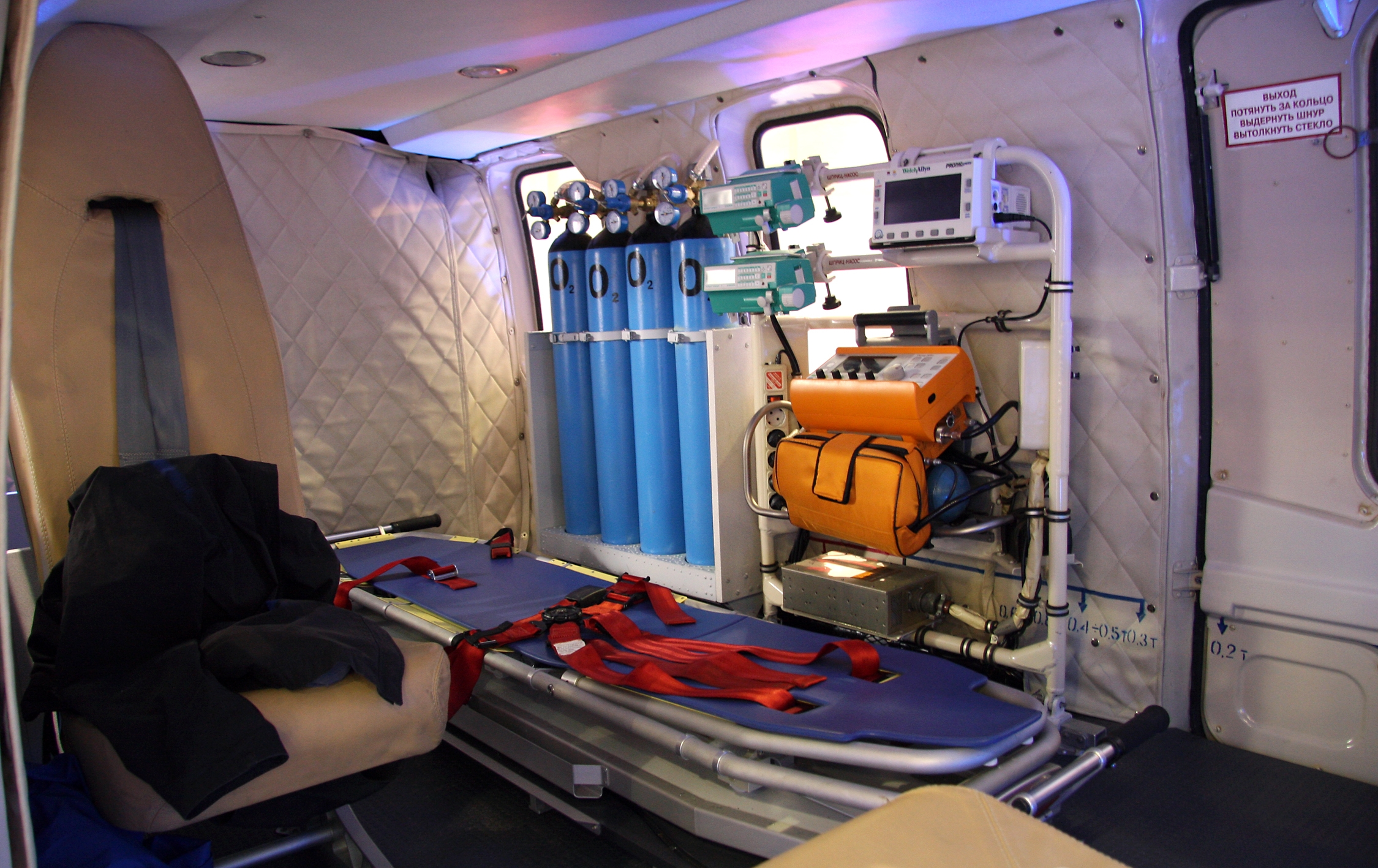 Ансат в медицинском варианте